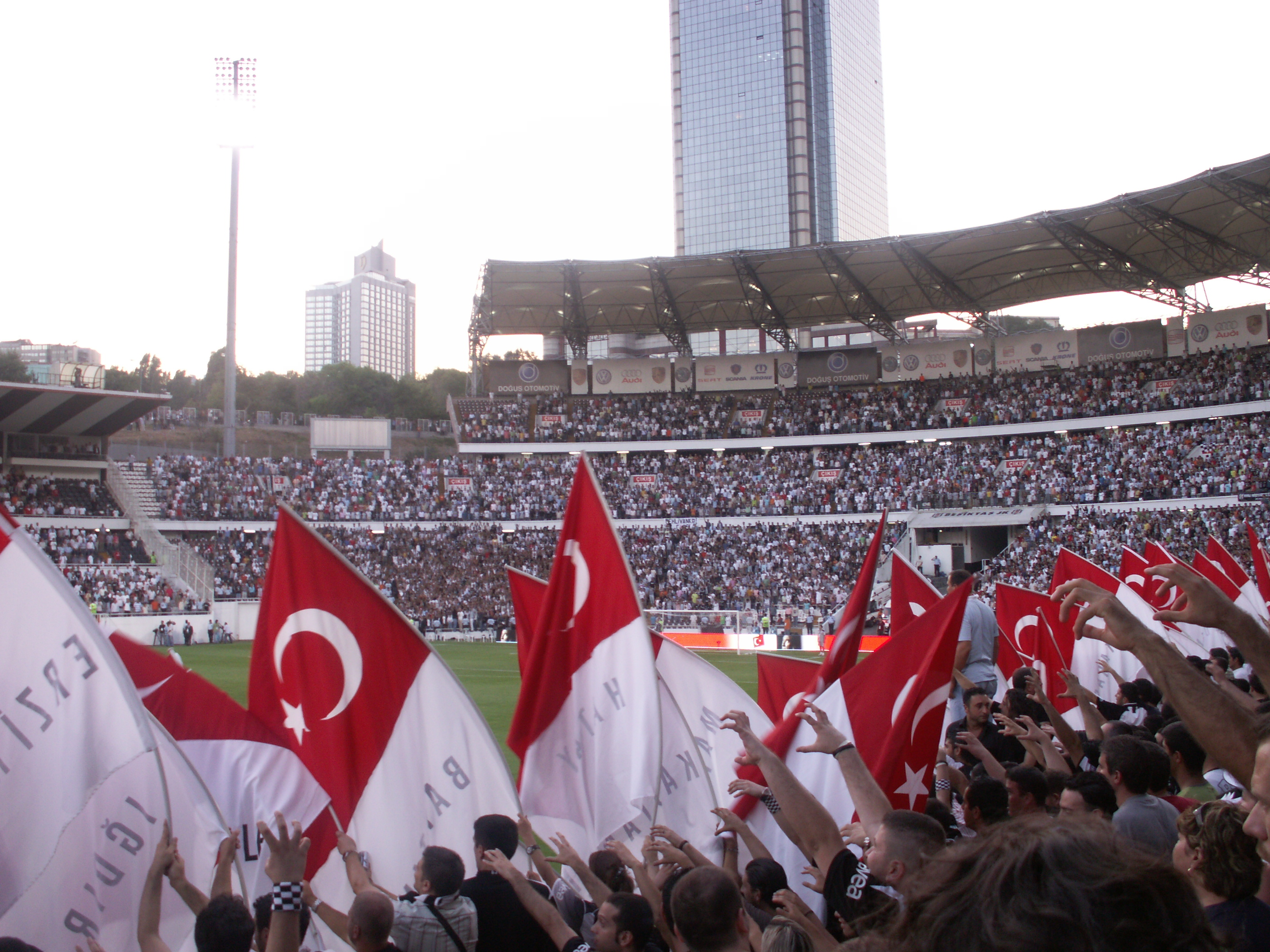 Fans of Beşiktaş